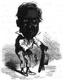 Caricature d'Isambert déguisé en Martiniquais, par Cham.